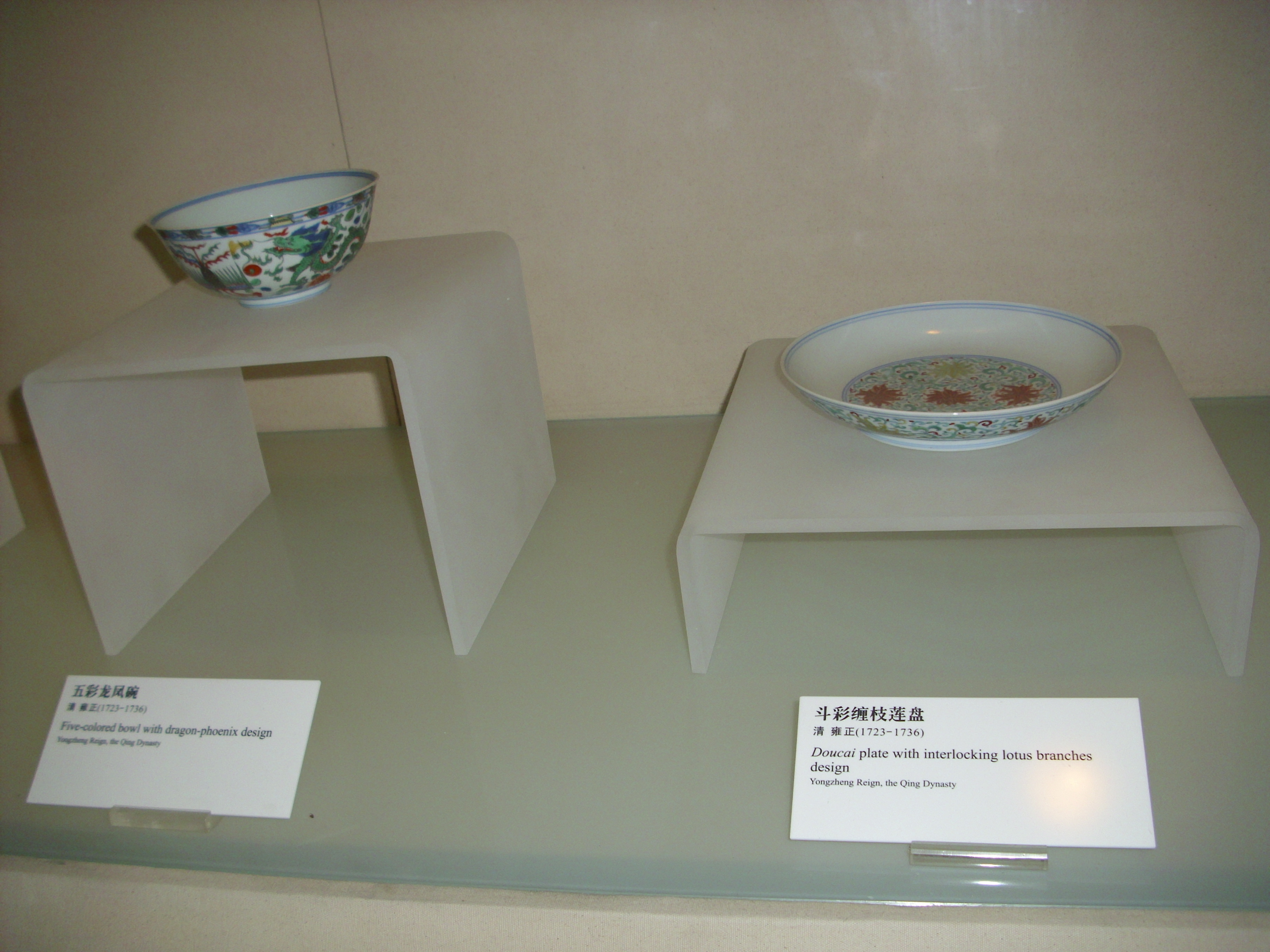 2009年10月8日摄于湖北省博物馆